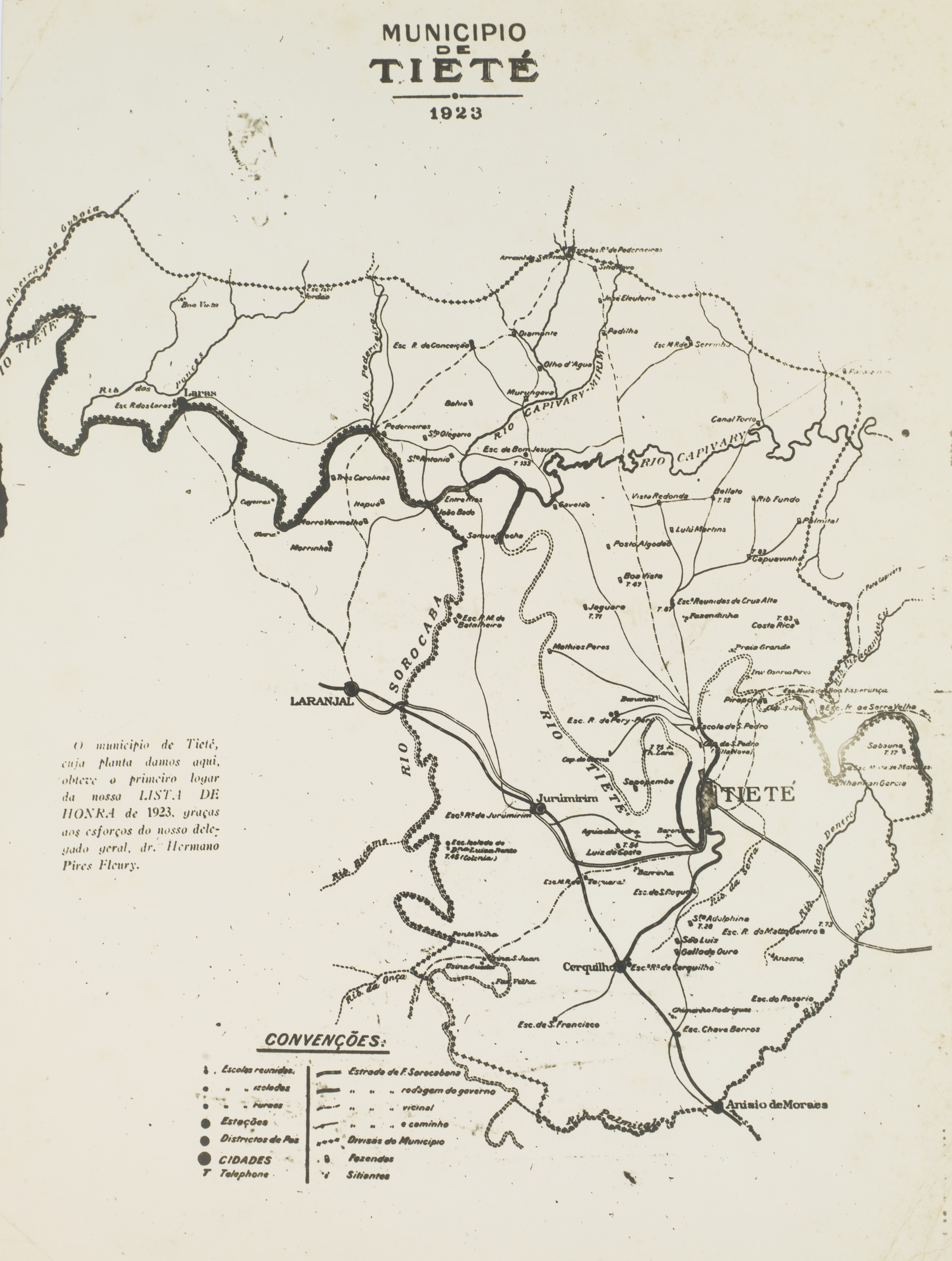 Obra que integra o acervo do Museu Paulista da USP. Coleção João Baptista de Campos Aguirra